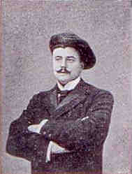 Portrait d'Adolphe Foucart représentant la Belgique au premier Conseil Fédéral de Présidence de la Corda Fratres en 1898. Il porte une faluche.